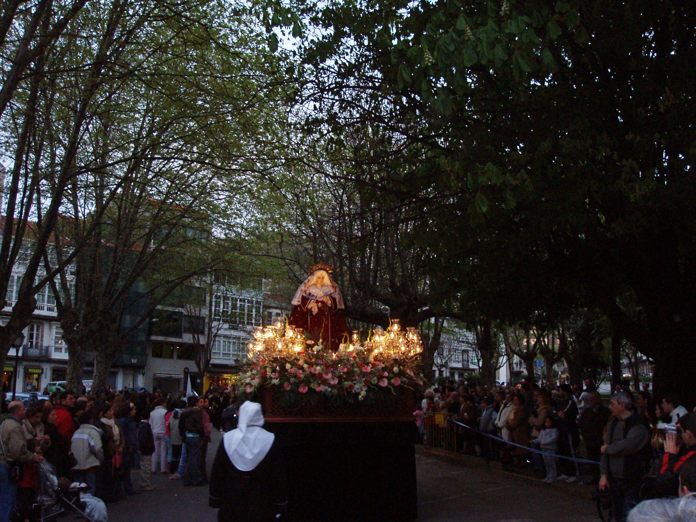 María Santísima de los Desamparados, en procesión durante el Míercoles Santo de 2.006.